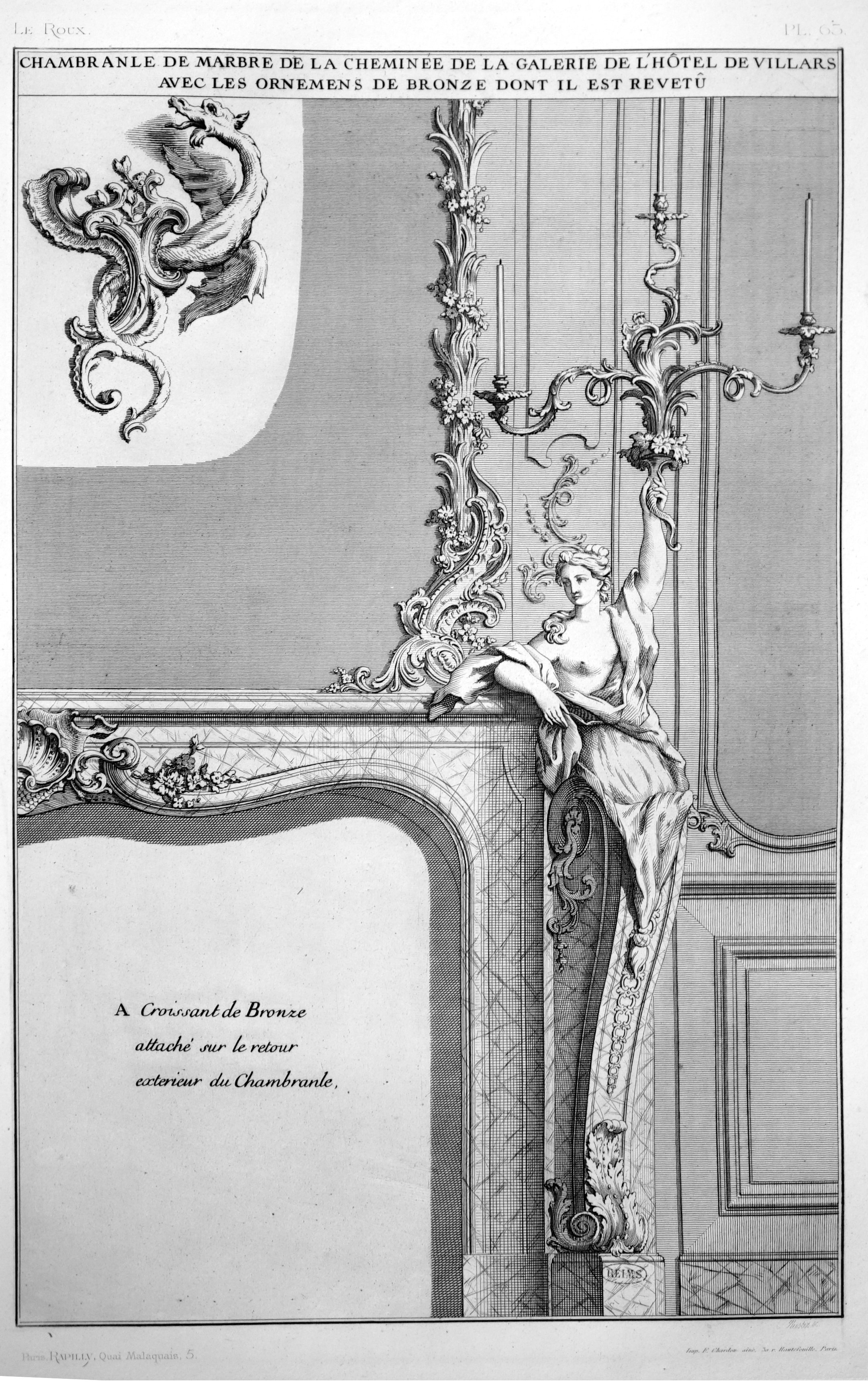 travail de l'histoire de l'art de Pfnor.